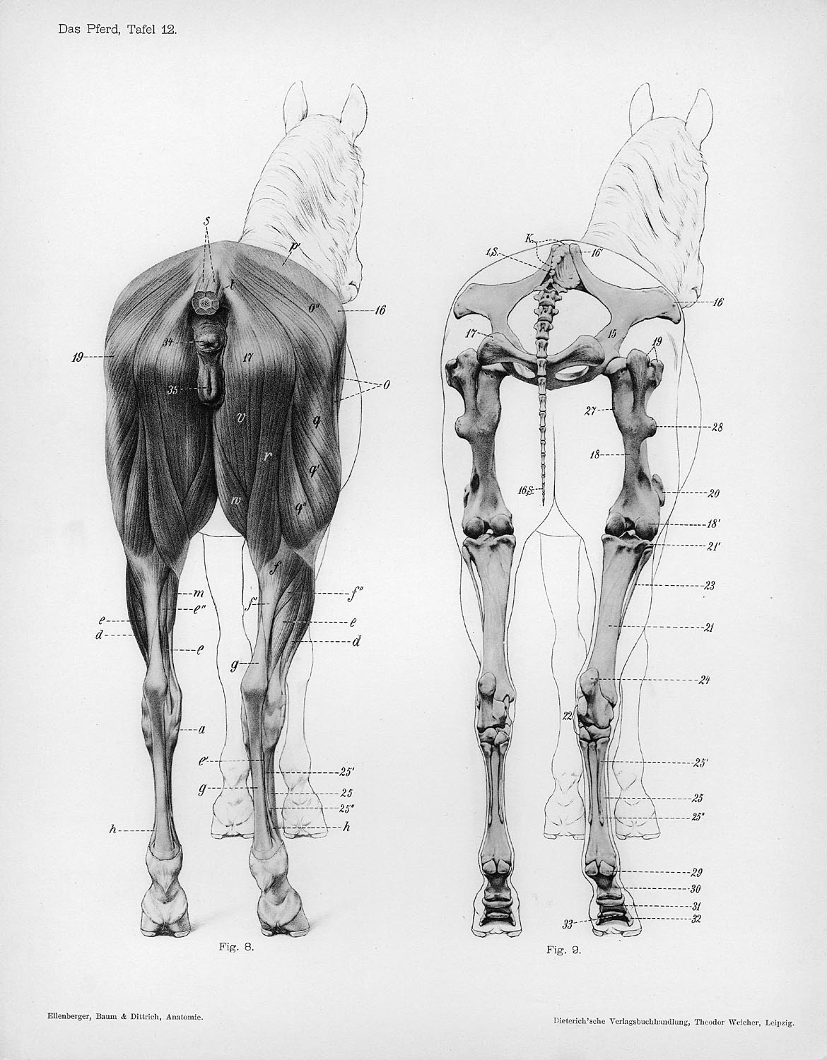 Animal anatomical engraving from Handbuch der Anatomie der Tiere für Künstler' - Hermann Dittrich, illustrator.